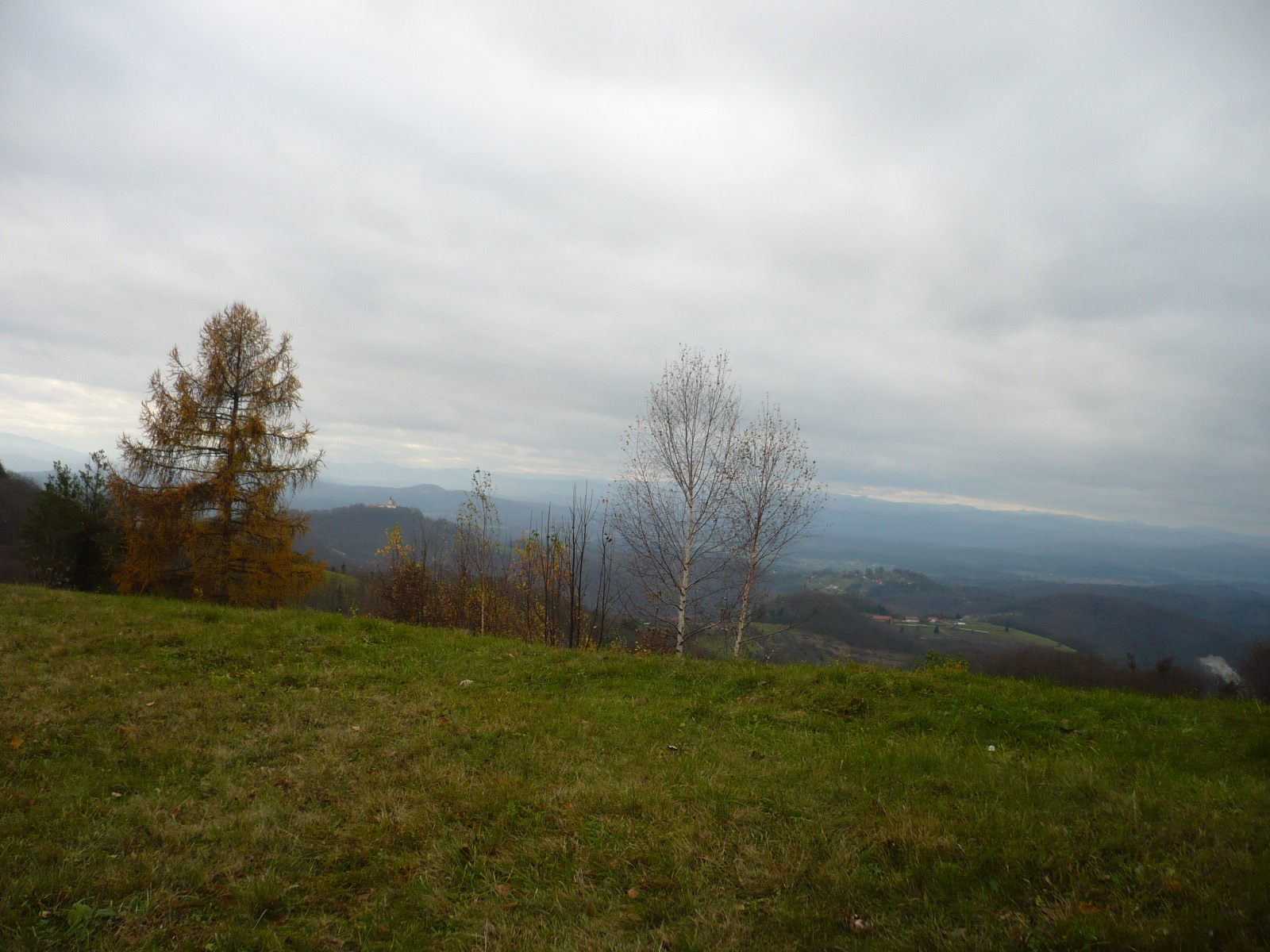 Popotovanje iz Litije do Čateža